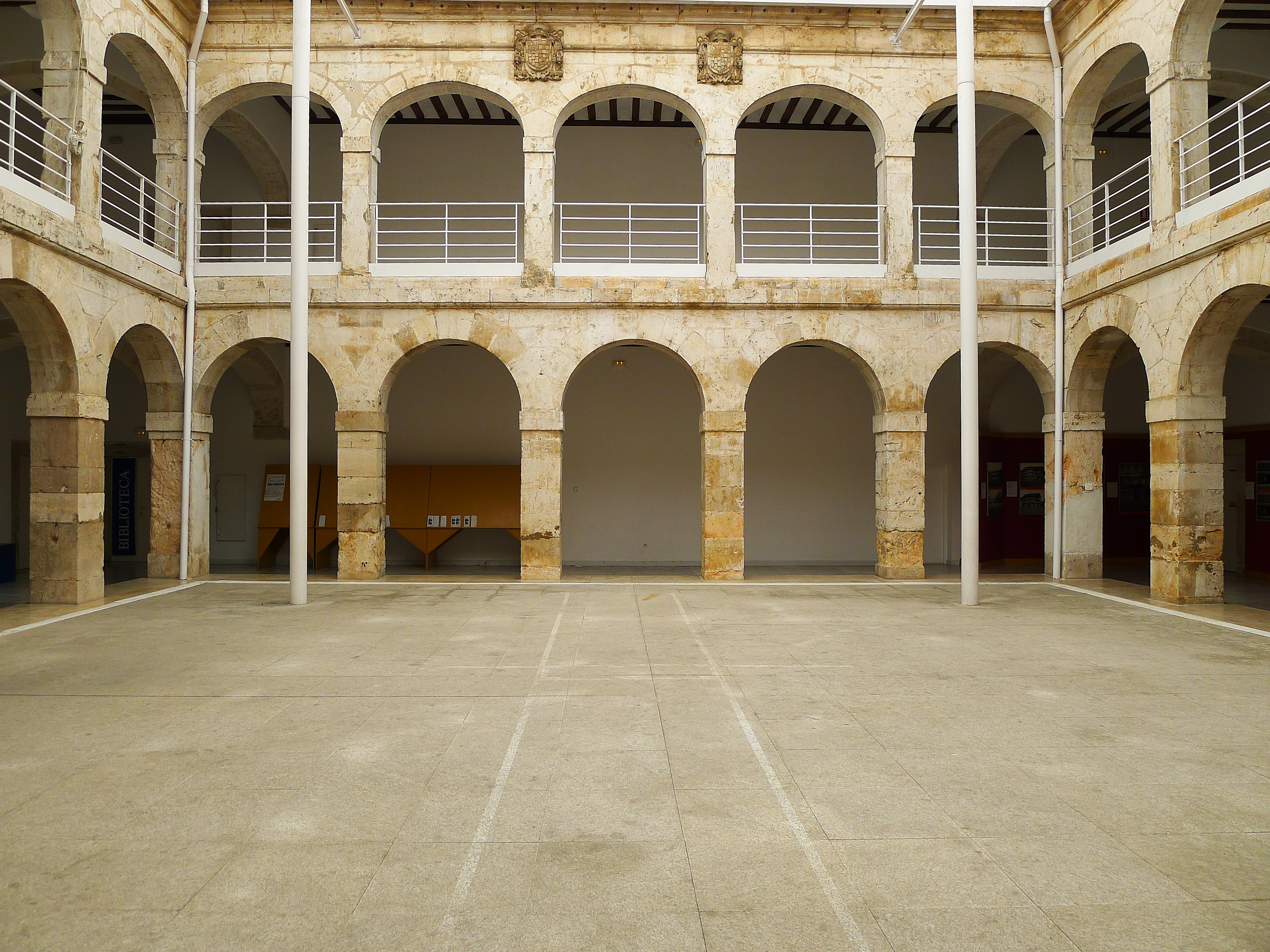 Sufragado por el obispo Sebastián de Arévalo Torres (1682-1704). Según proyecto de Cipriano Antonio Miguel, el patio de hechura herreriana-barroca, sigue el estilo del edificio que ejectan Pedro Portela e Hijo, e Ignacio de Moncalcán.